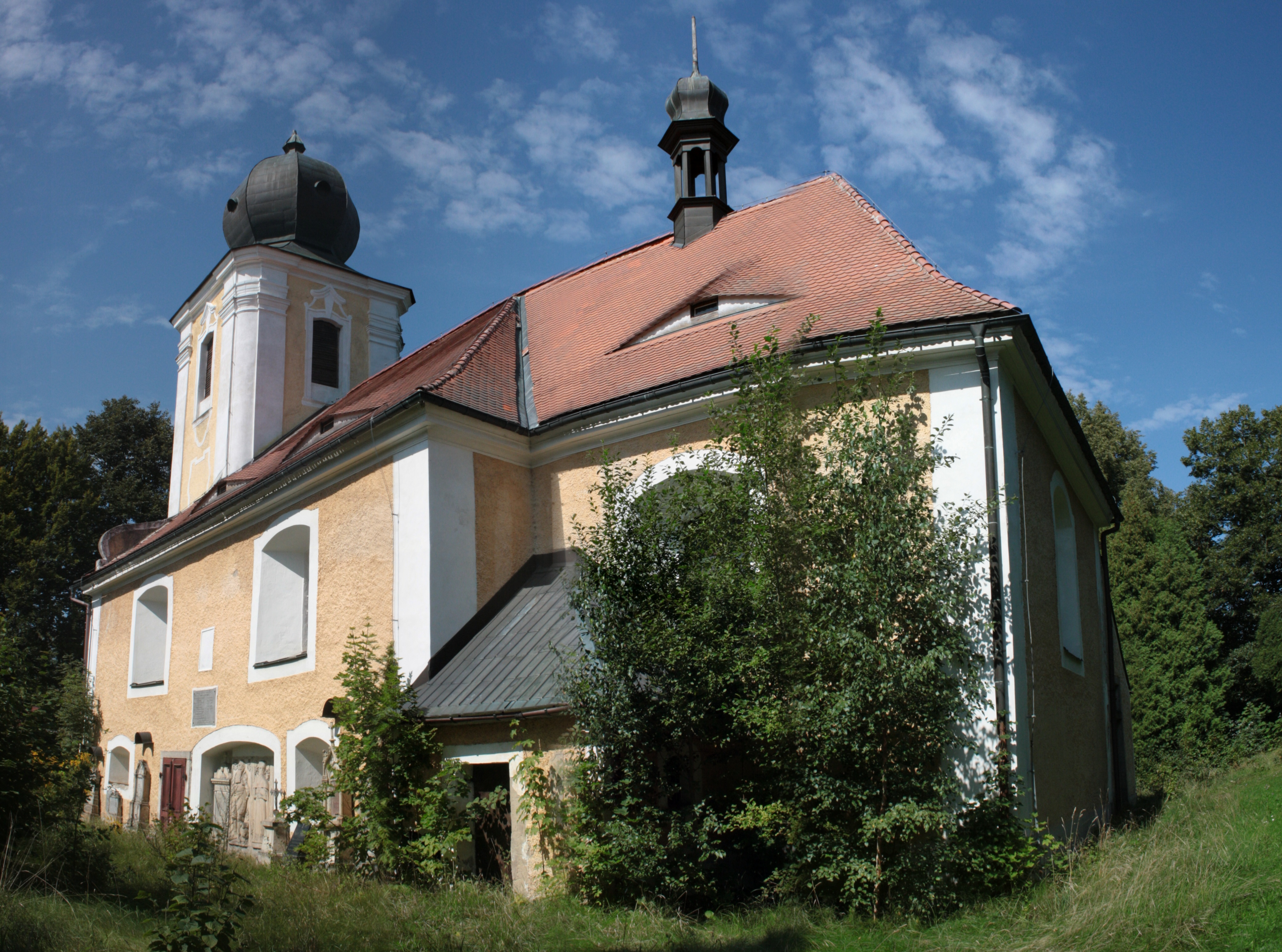 This photograph was taken with a DSLR from WMCZ's Camera grant. Kostel svaté Heleny v Krásném Lese v Libereckém okrese.